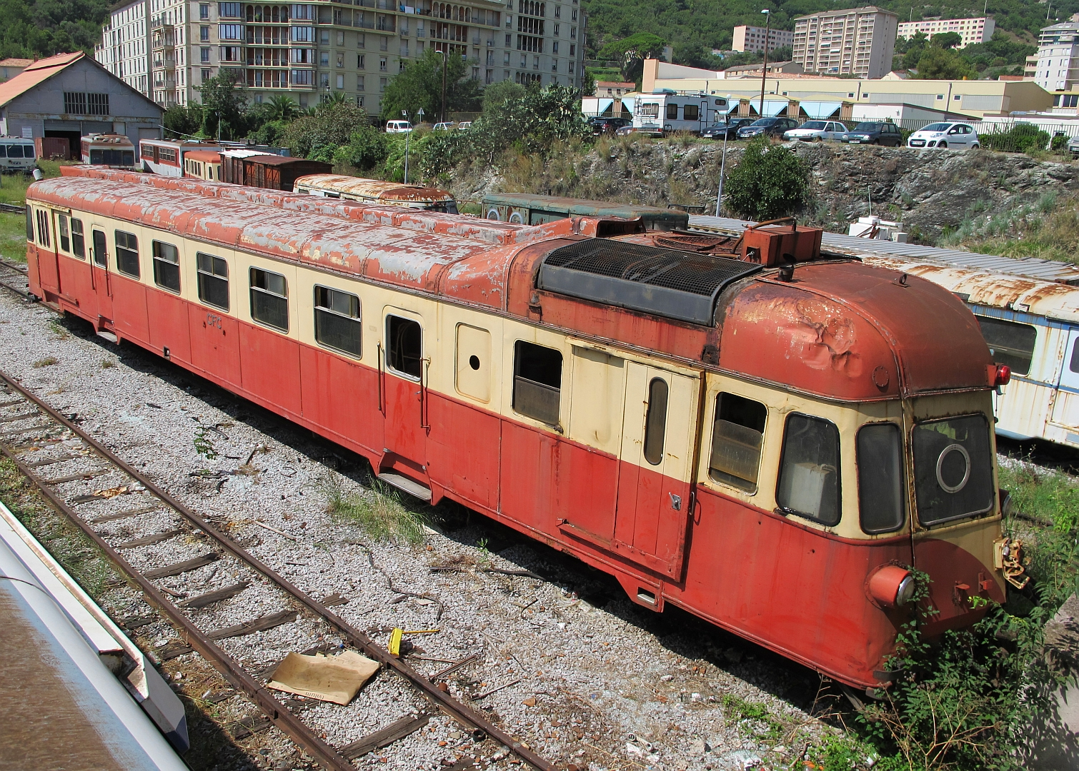 L'autorail ABH8 204 garé réformé à Bastia le 4 août 2014.